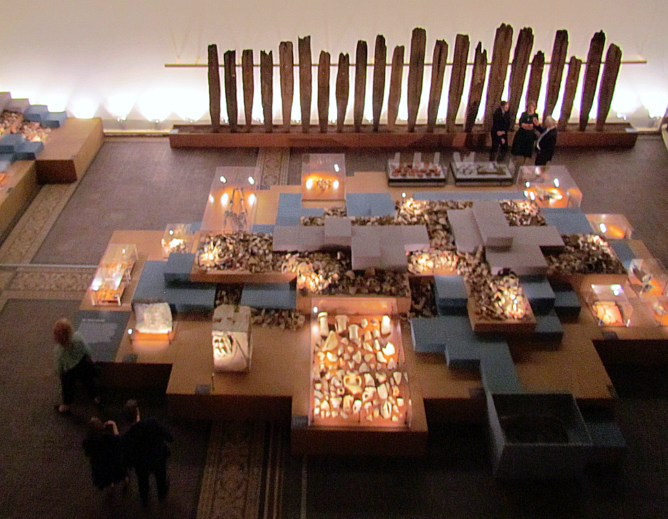 Fast 2000 Jahre alter Abschnitt der Hafenmauer und Hafenbeckenfunde des römischen Kölns in der Ausstellung "Bewegte Zeiten. Archäologie in Deutschland" in Berlin